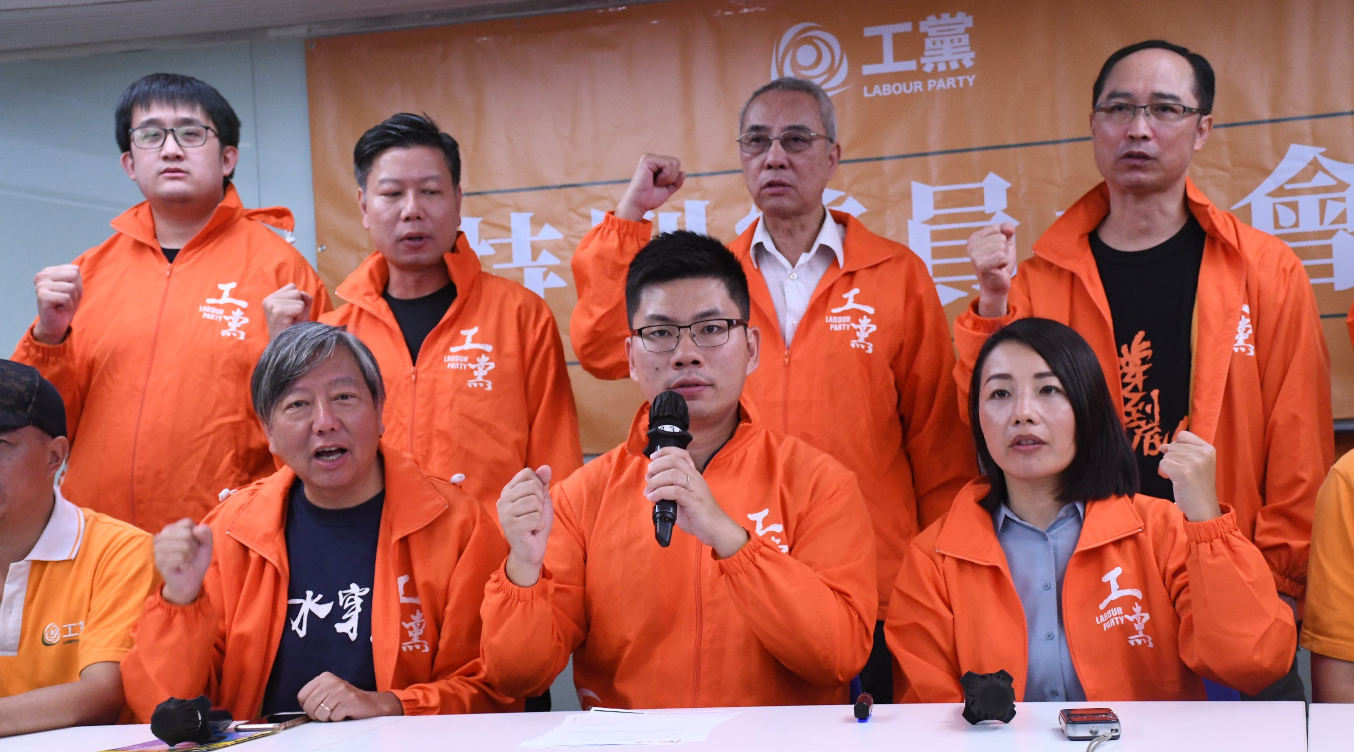 香港工黨宣佈推薦劉小麗(右)參與立法會九龍西地區議席補選。(美國之音特約記者 湯惠芸拍攝 )